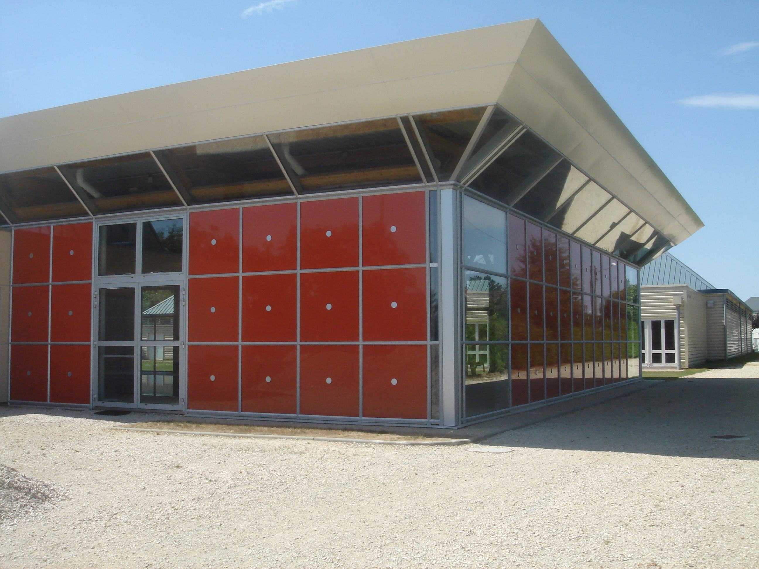 Bassin d'apprentissage de natation, stade de la Cherelle, Jargeau, Loiret, France